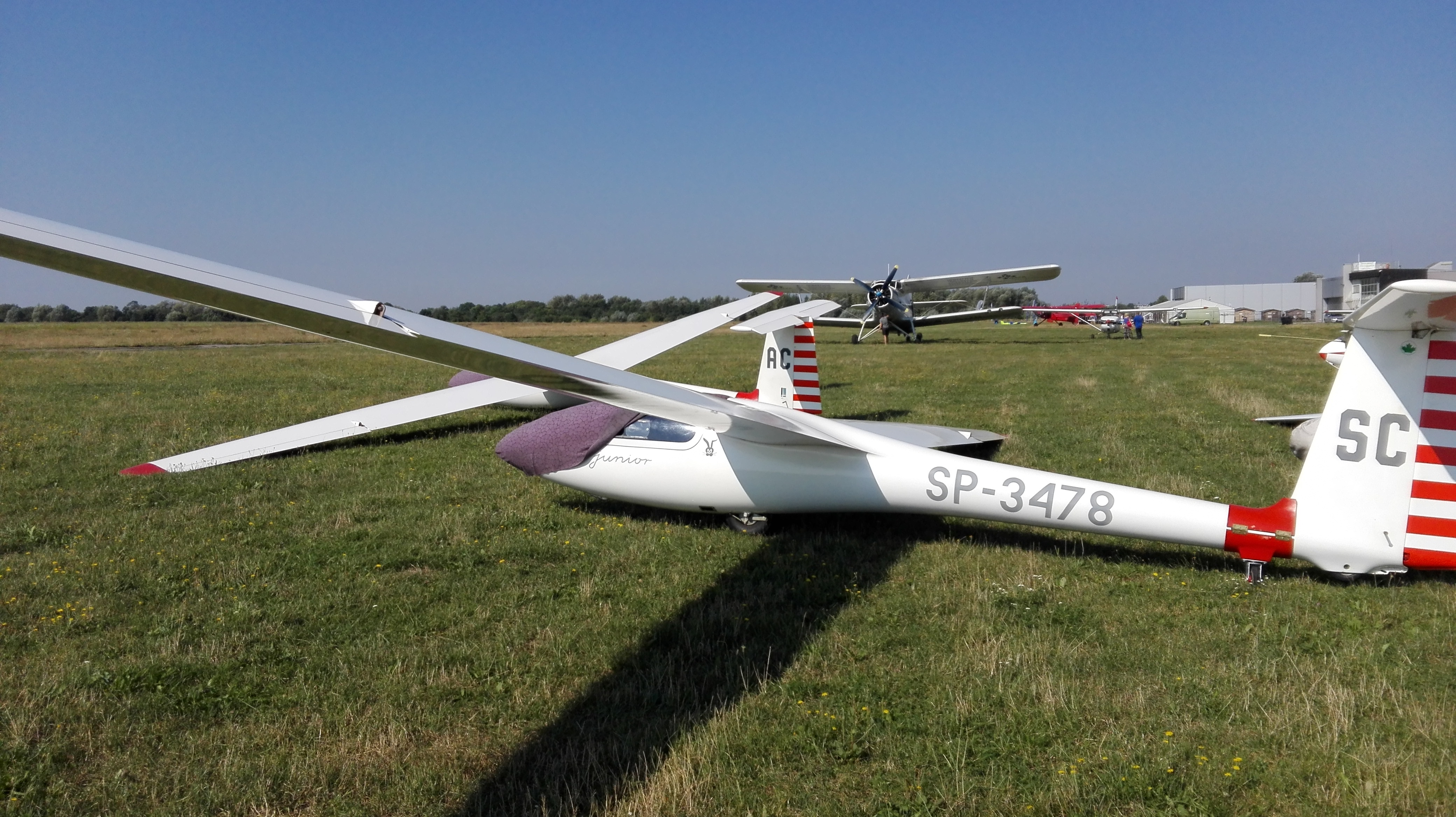 Statki powietrzne: SZD-51 Junior SP-3478 (SC), SP-3430(AC), An-2 SP-AOB, Cessna 172 Skyhawk H SP-FLT — lotnisko Gliwice-Trynek